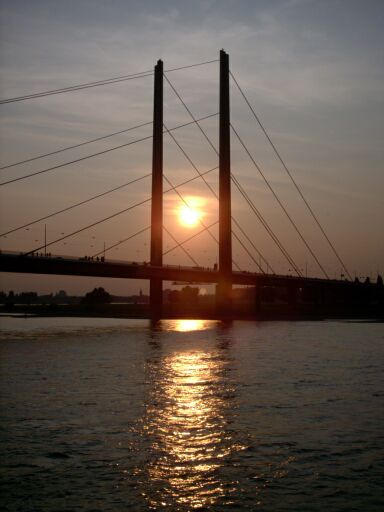 Rheinkniebrücke